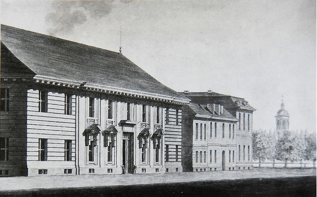 Ansicht des Berliner Gießhauses, erbaut um 1700.